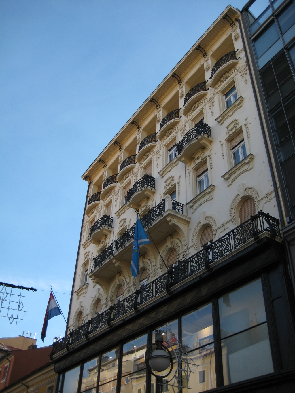 Zgrada Primorsko-goranske županije u Rijeci